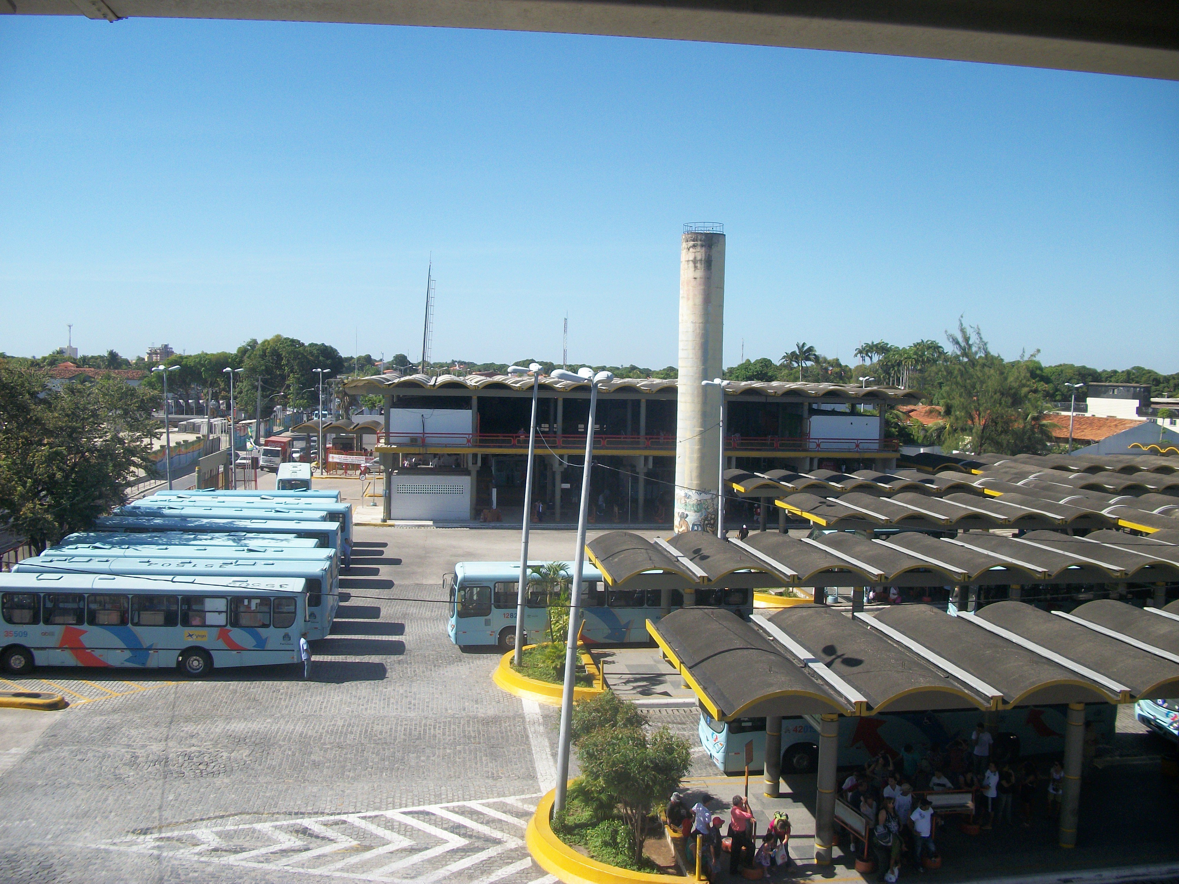 Terminal rodoviário municipal da Parangaba